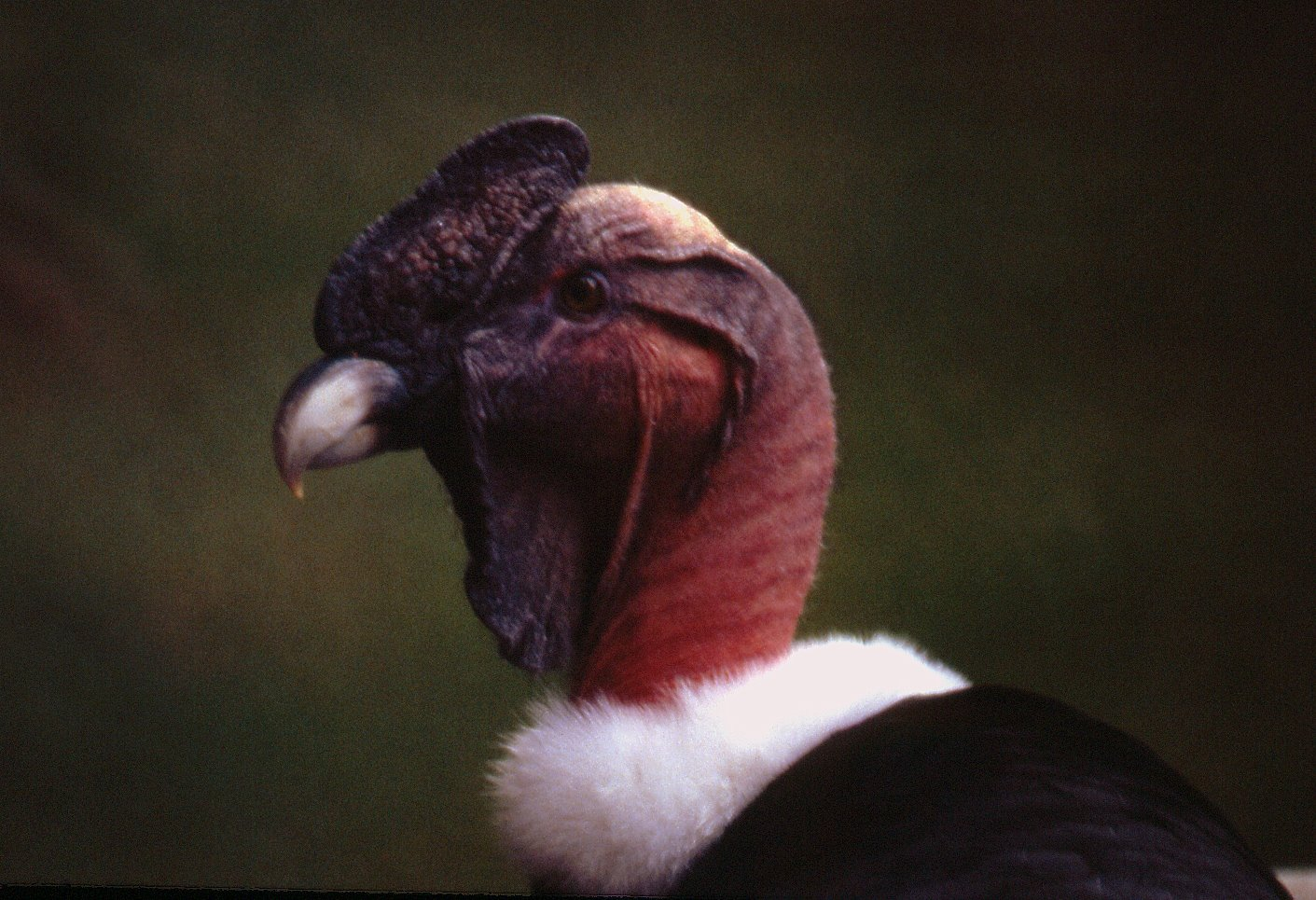 Vultur gryphus, male.